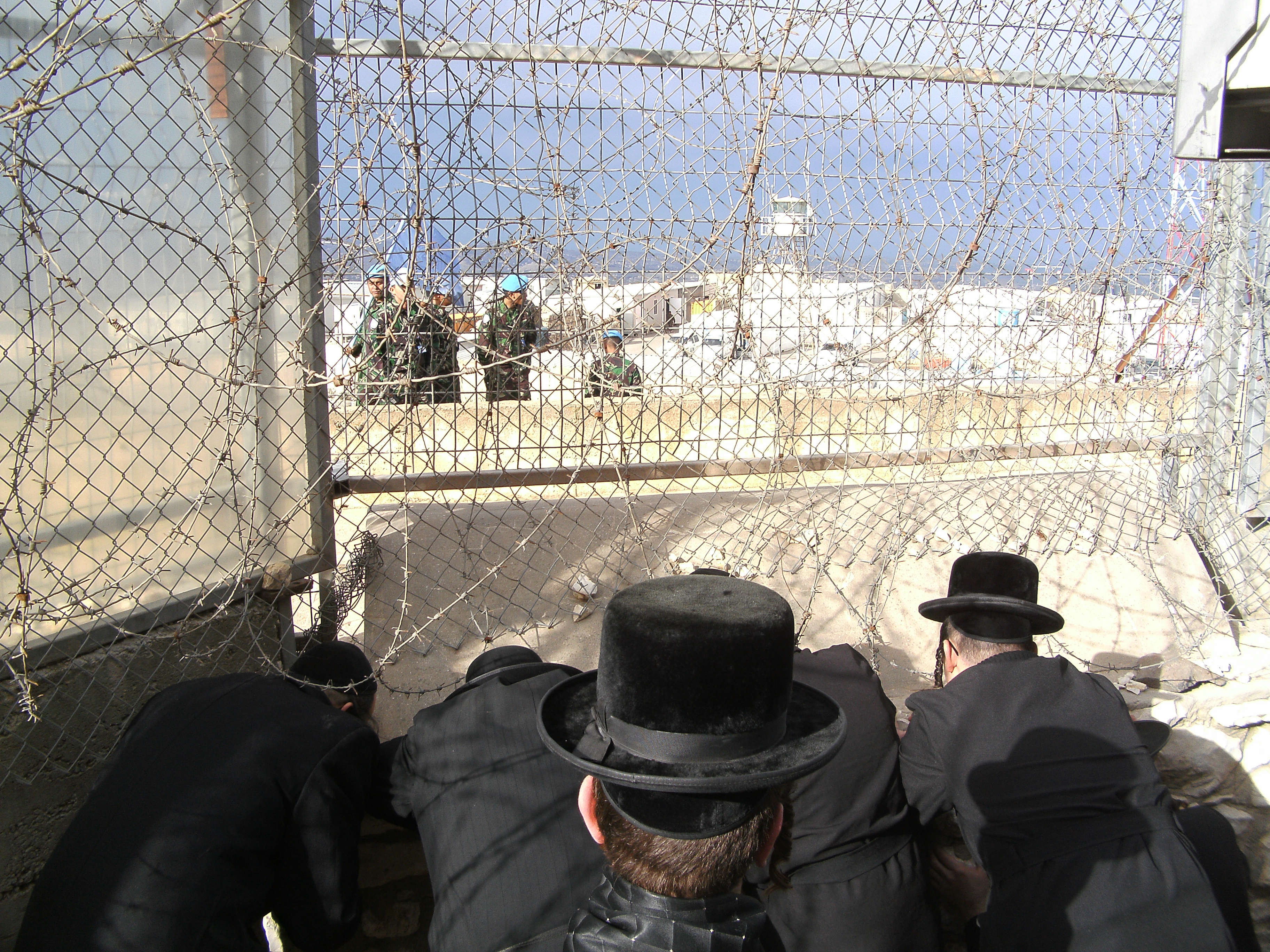 קבר רב אשי בגבול לבנון